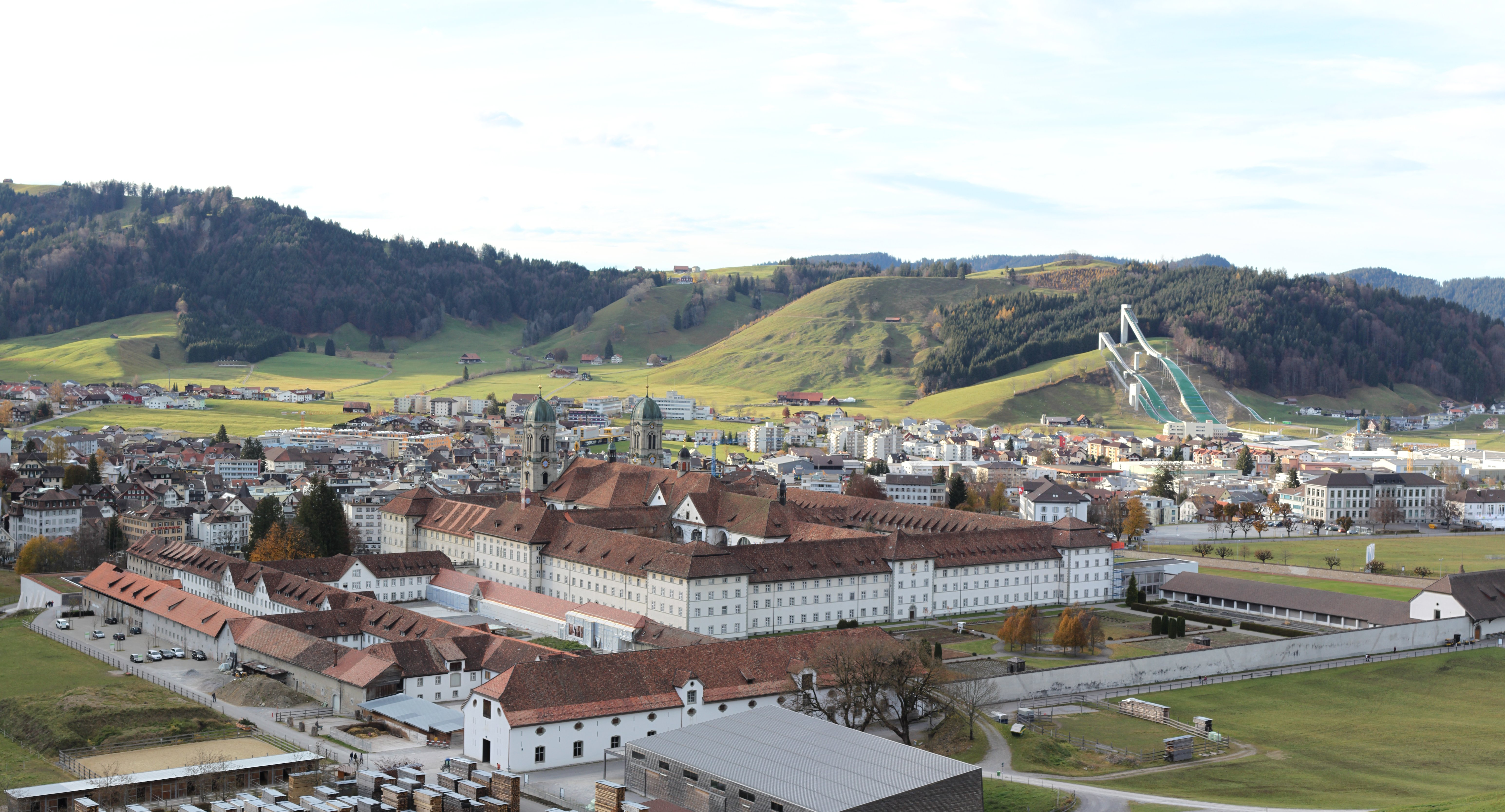 Einsiedeln Abbey